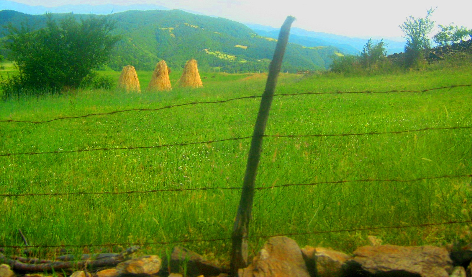 Гърнати